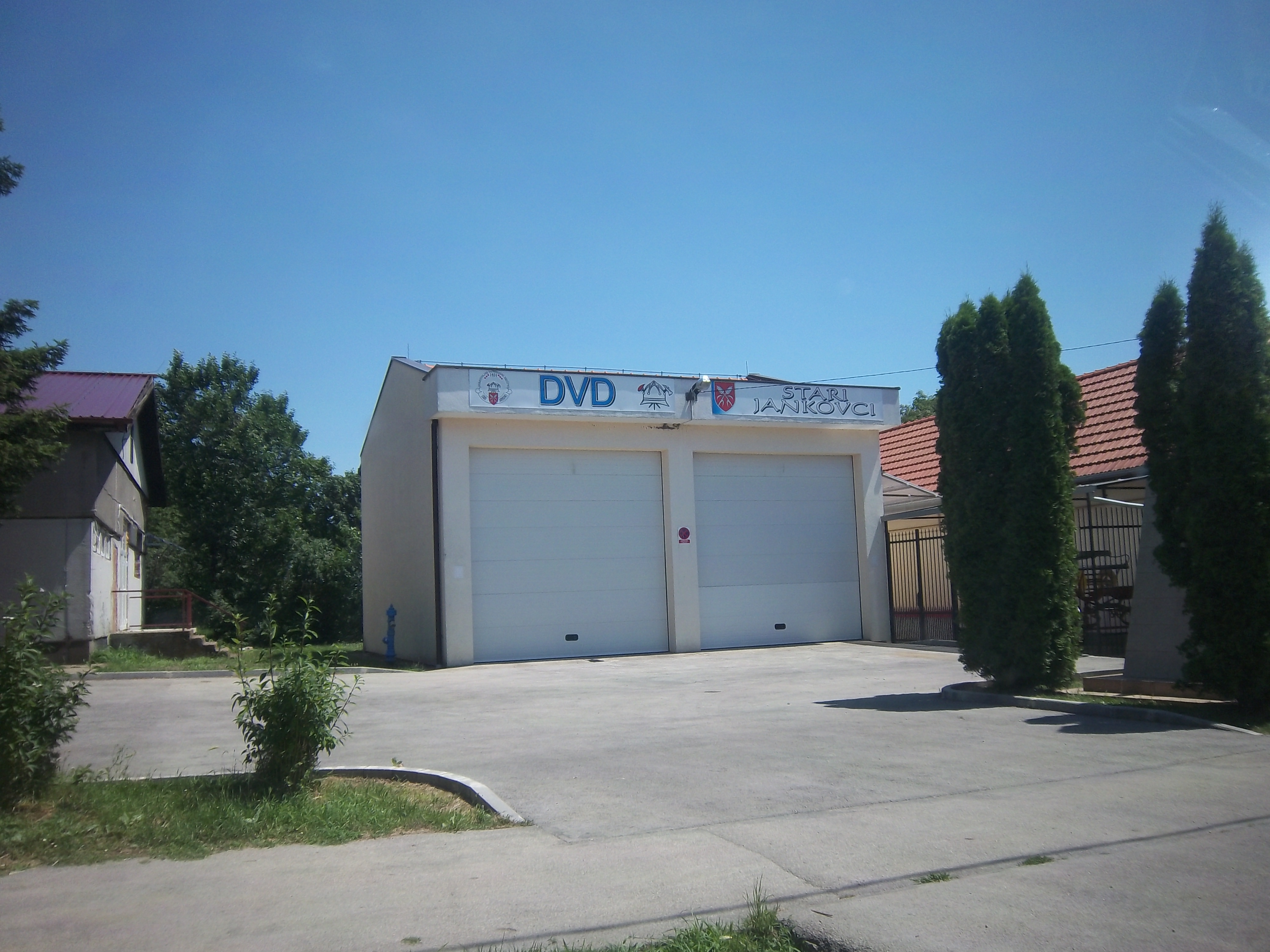 Srpskohrvatski / српскохрватски: DVD u Starim Jankovcima, Republika Hrvatska